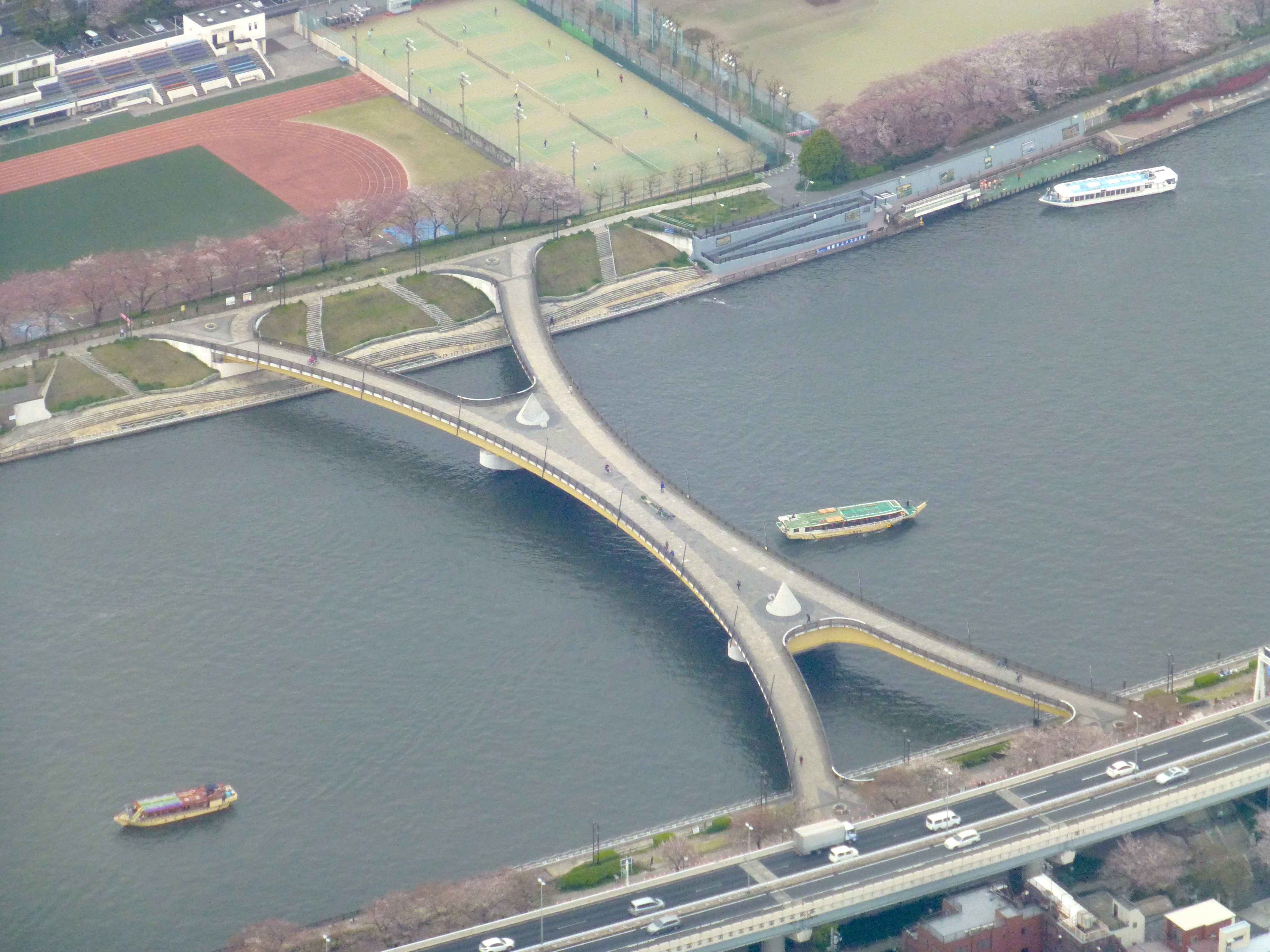 桜橋（さくらばし, Sakurabashi）